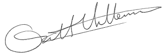 Signature Gilles Villeneuve